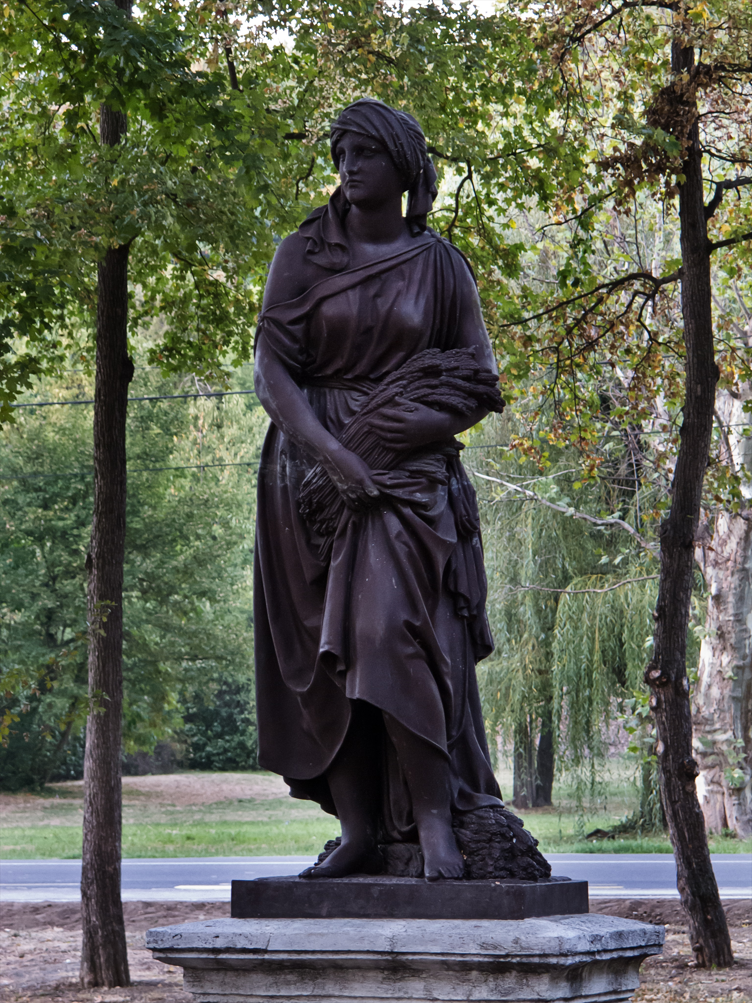 Скулптура „Жетелица“, Топчидерски парк, Београд, Србија